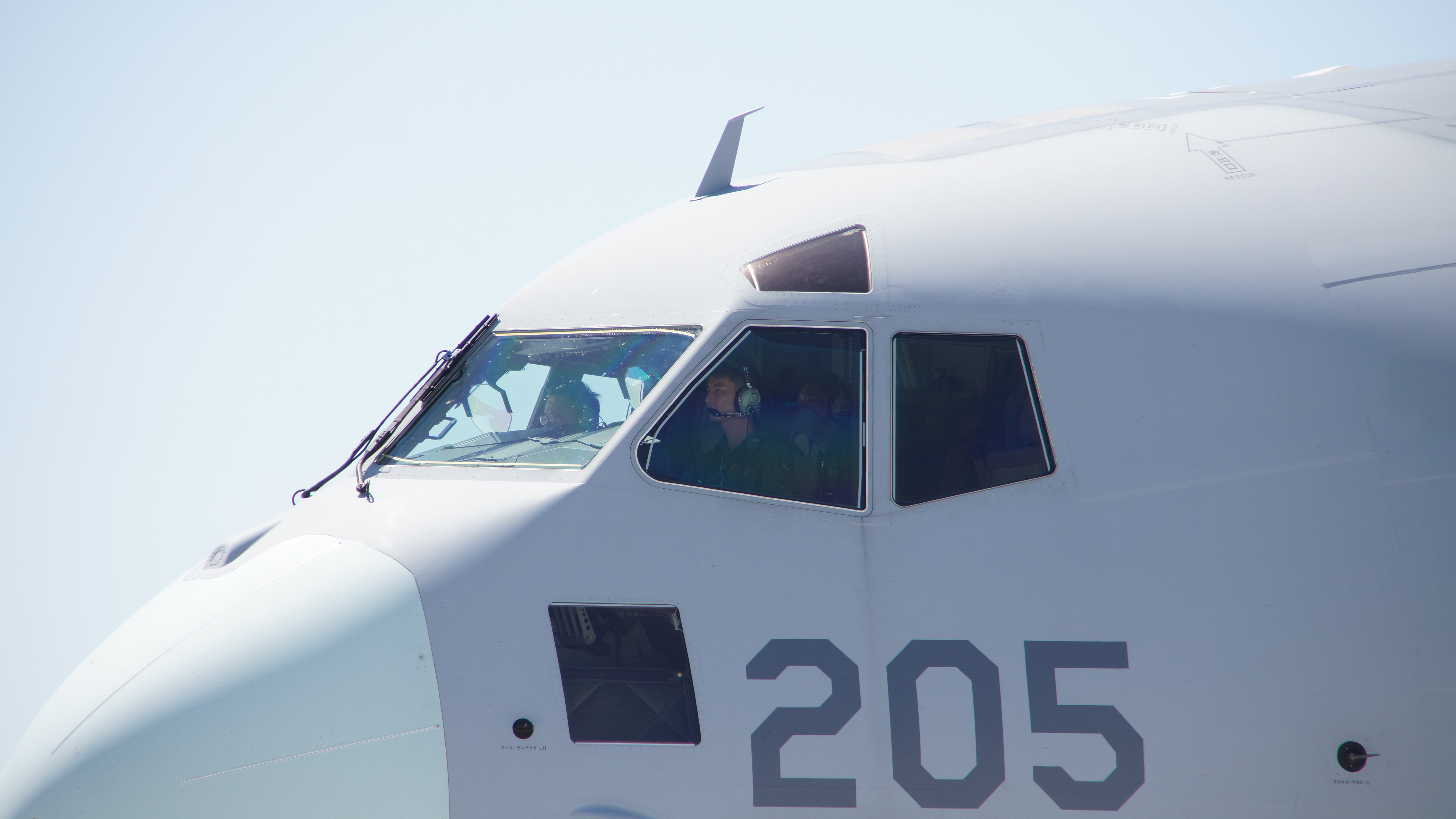 航空自衛隊 C-2輸送機（78-1205号機） キャノピー 左前面。2017年5月28日 美保基地にて。